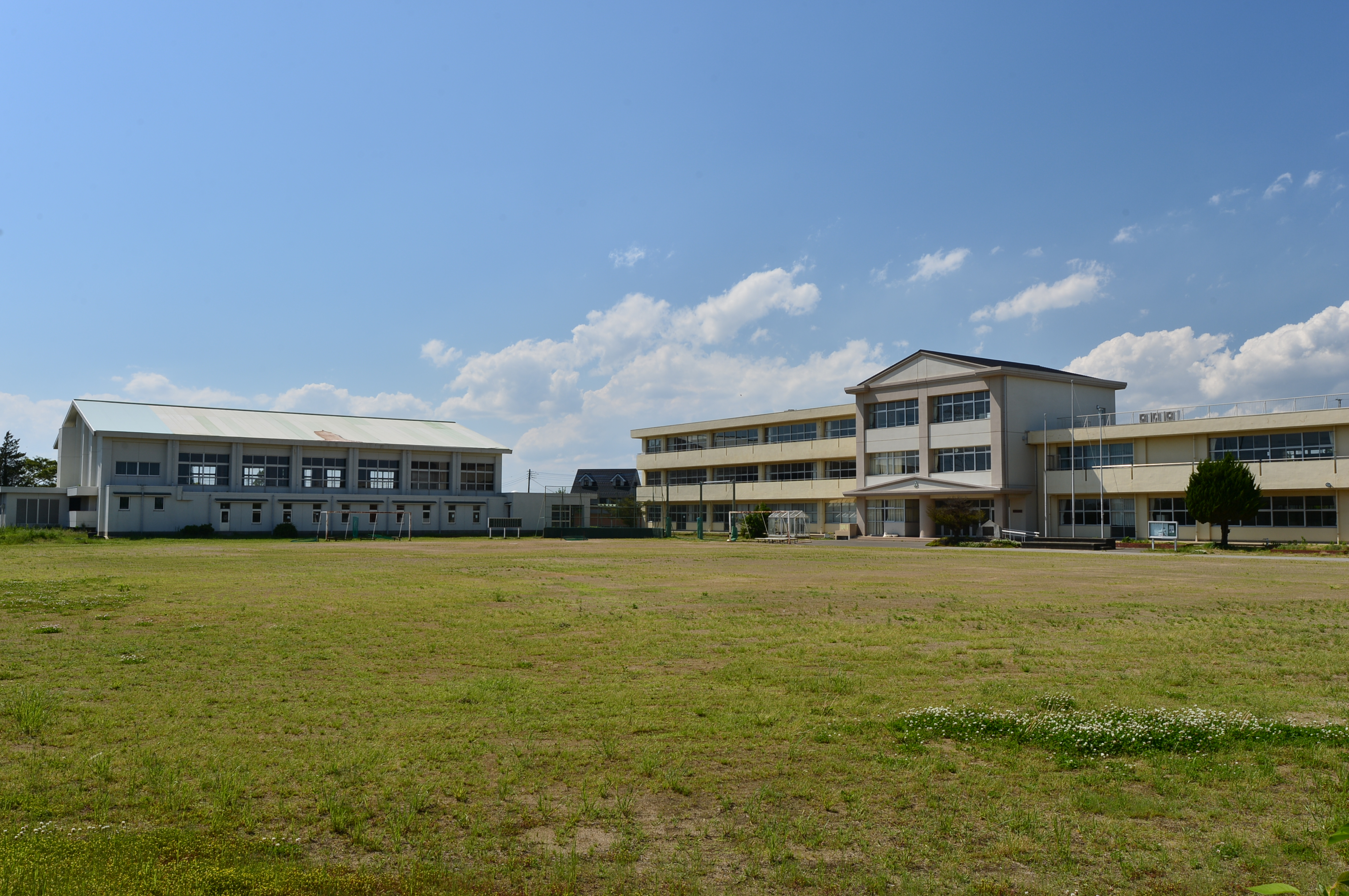 旧河内町立河内中学校。茨城県稲敷郡河内町の旧河内町立河内中学校の校舎と校庭。少子化により金江津中学校との統合により2017年（平成29年）4月をもって廃校となった。